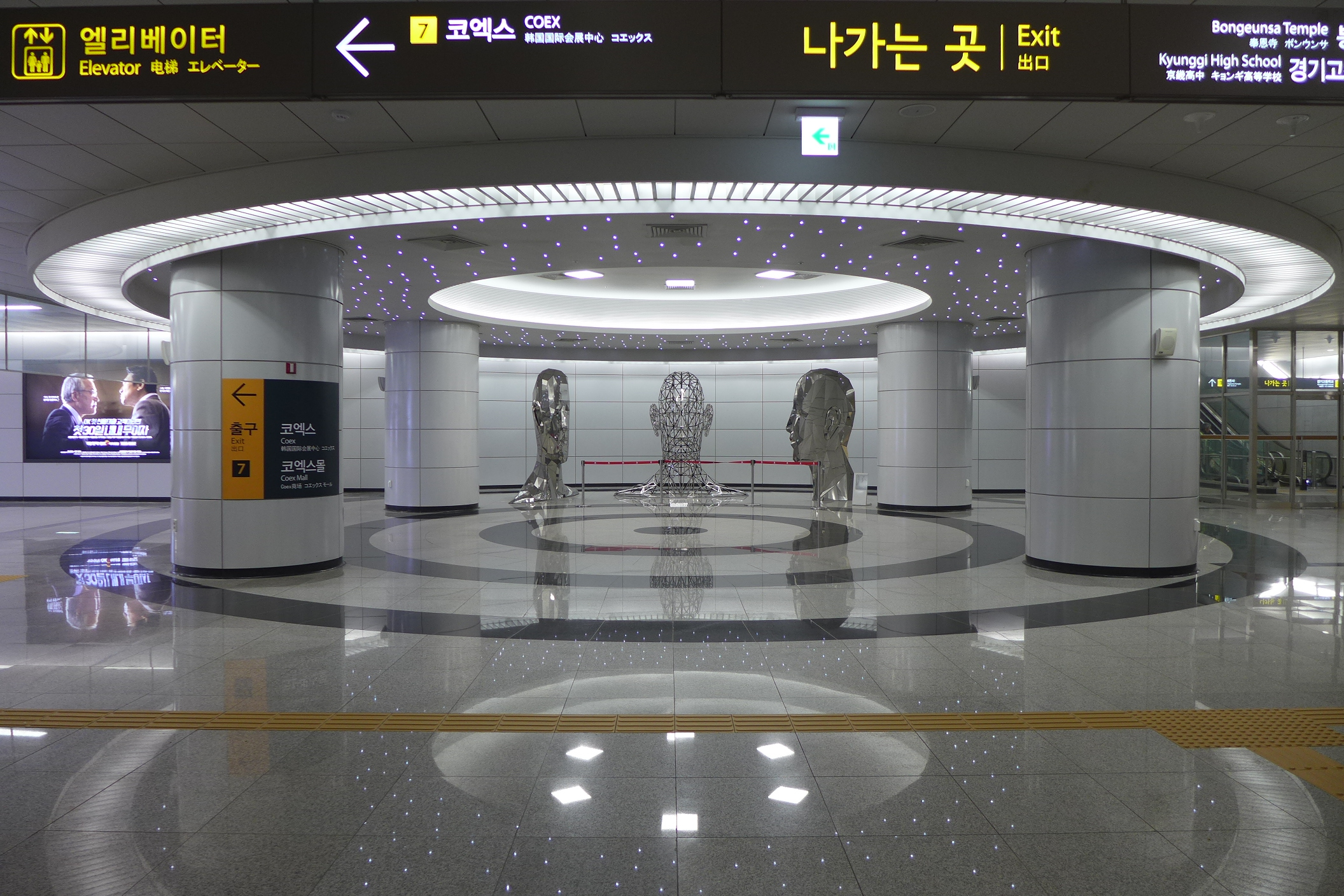 Bongeunsa Station Sculpture